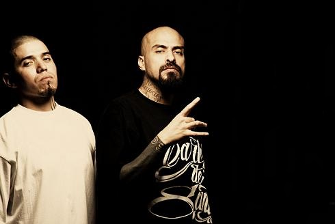 cartel de santa 2013